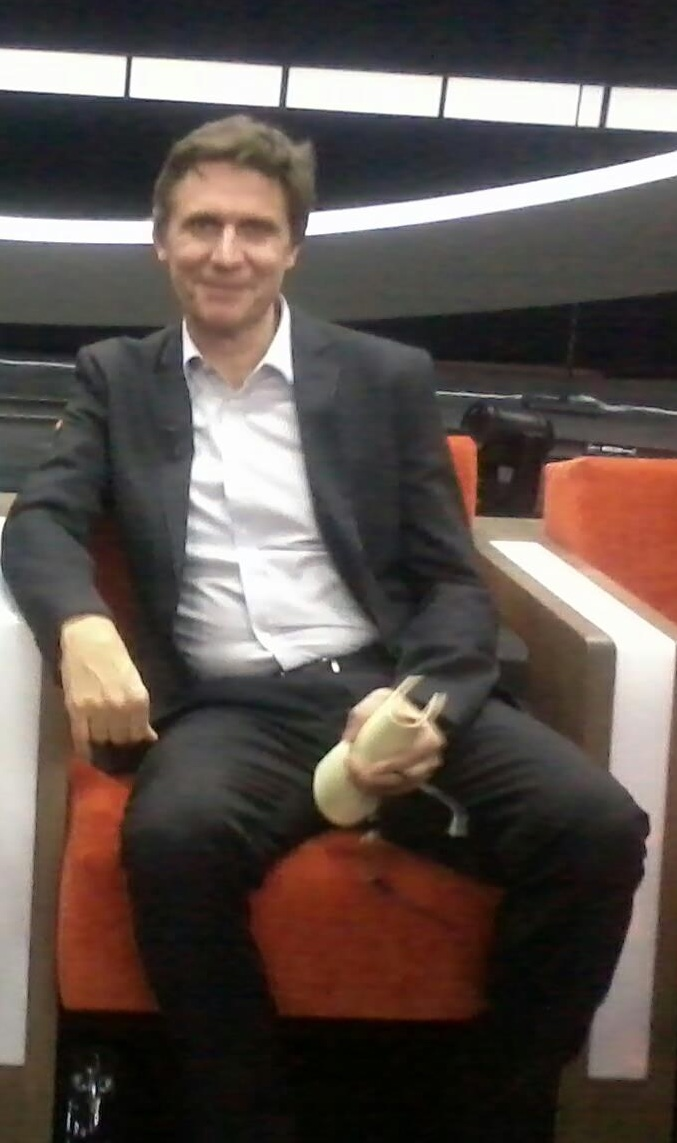 Erik Van Looy in het decor van De Slimste Mens ter Wereld op 28 oktober 2012